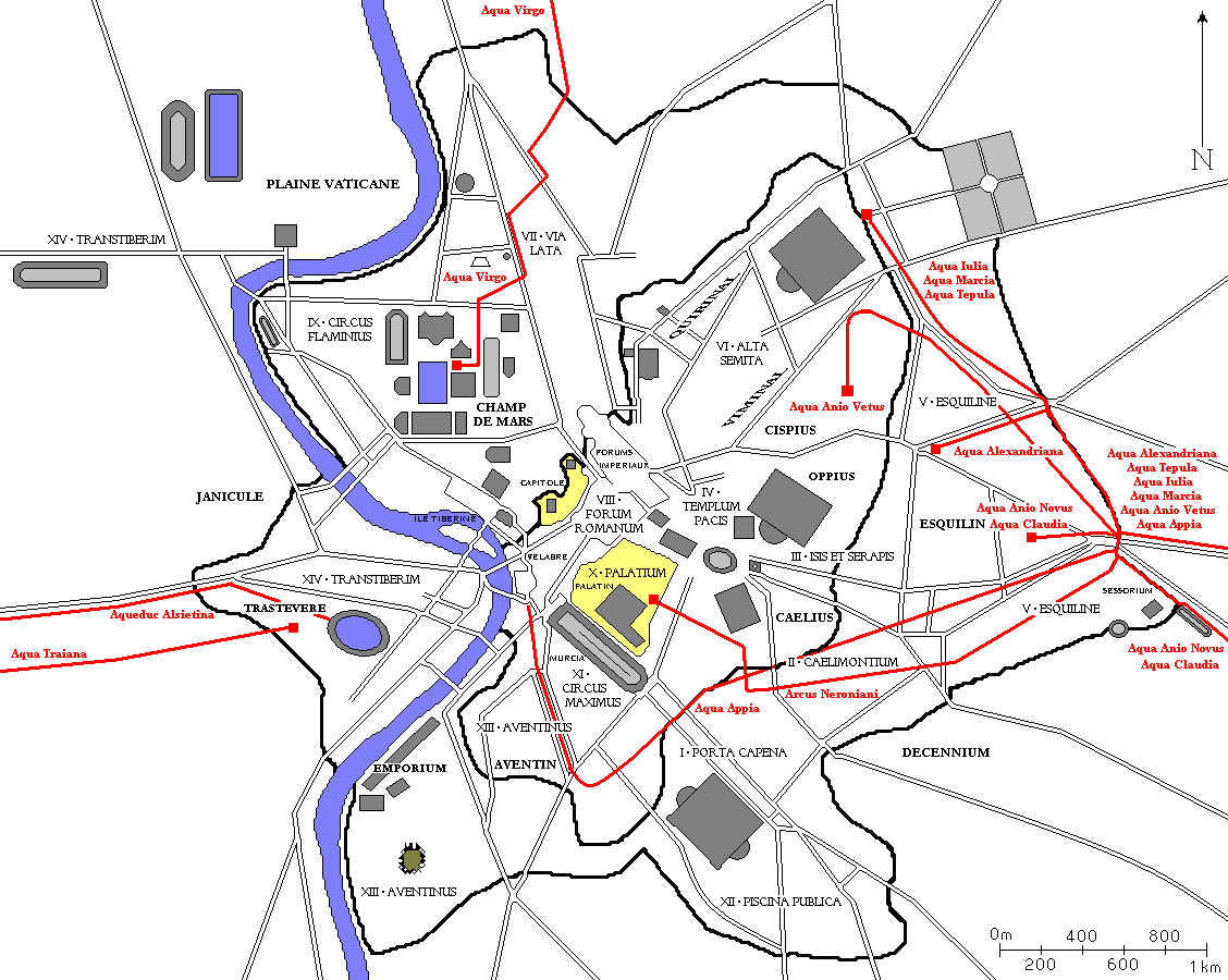 Plan de Rome avec les 11 aqueducs en rouge